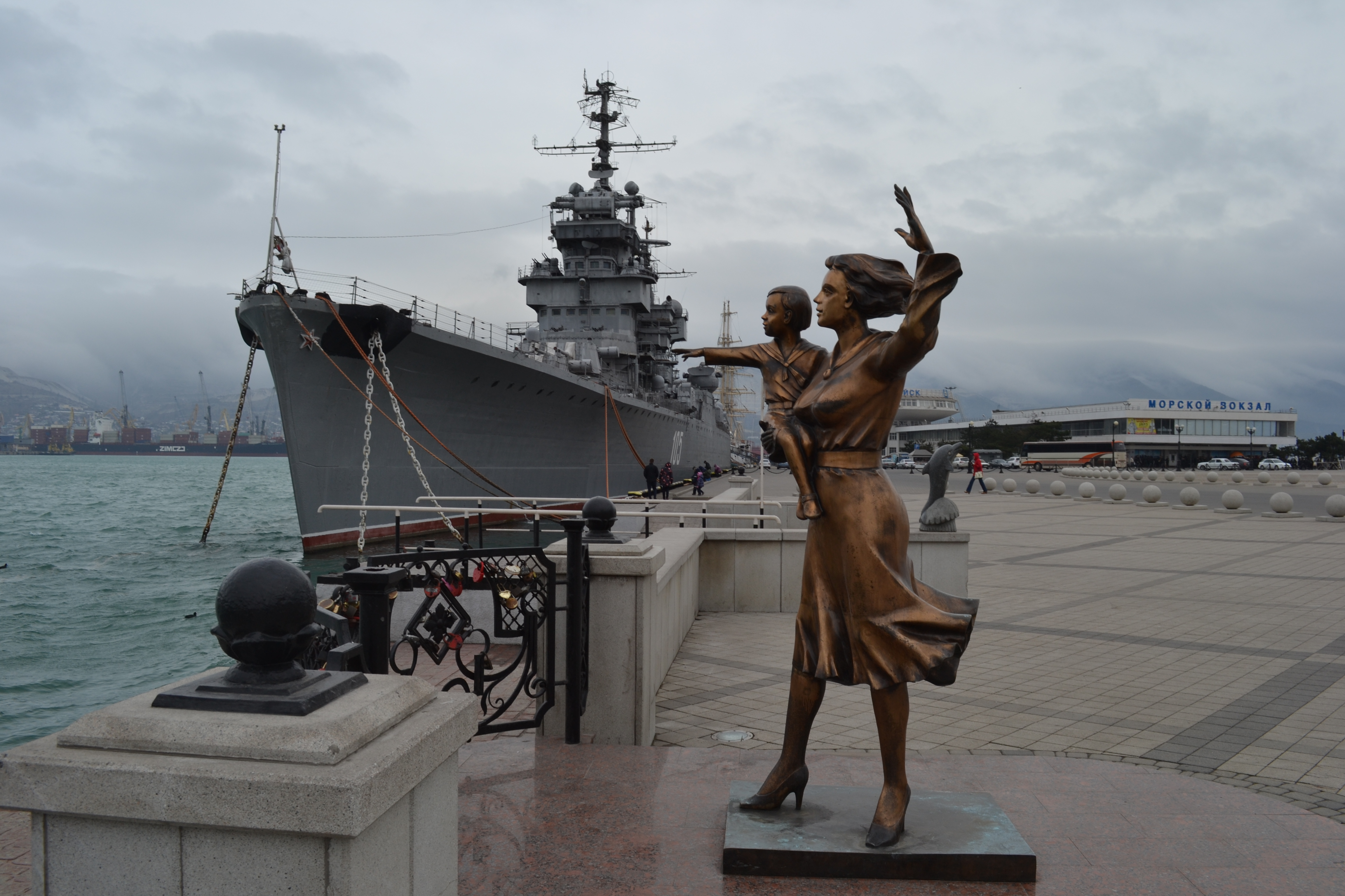 Встречающая. Ноябрь 2016 г.